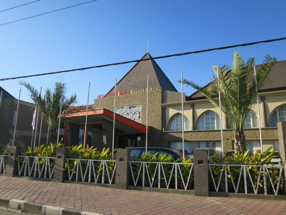 Hotel Novo Turismo, Dili